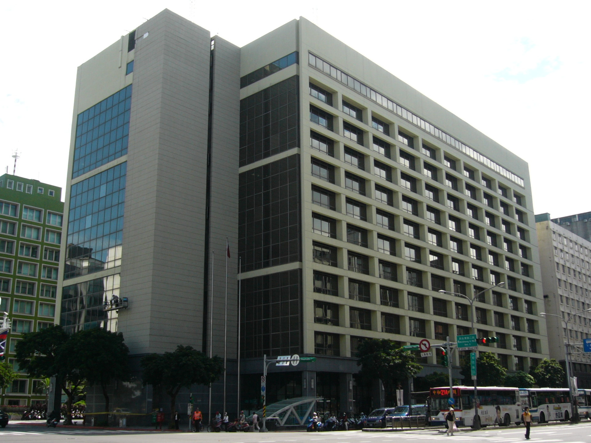 中文（台灣）: 中國青年救國團總團部、中央通訊社總部、榮民工程公司總部所在的志清大樓，位於臺北市中山區松江路。